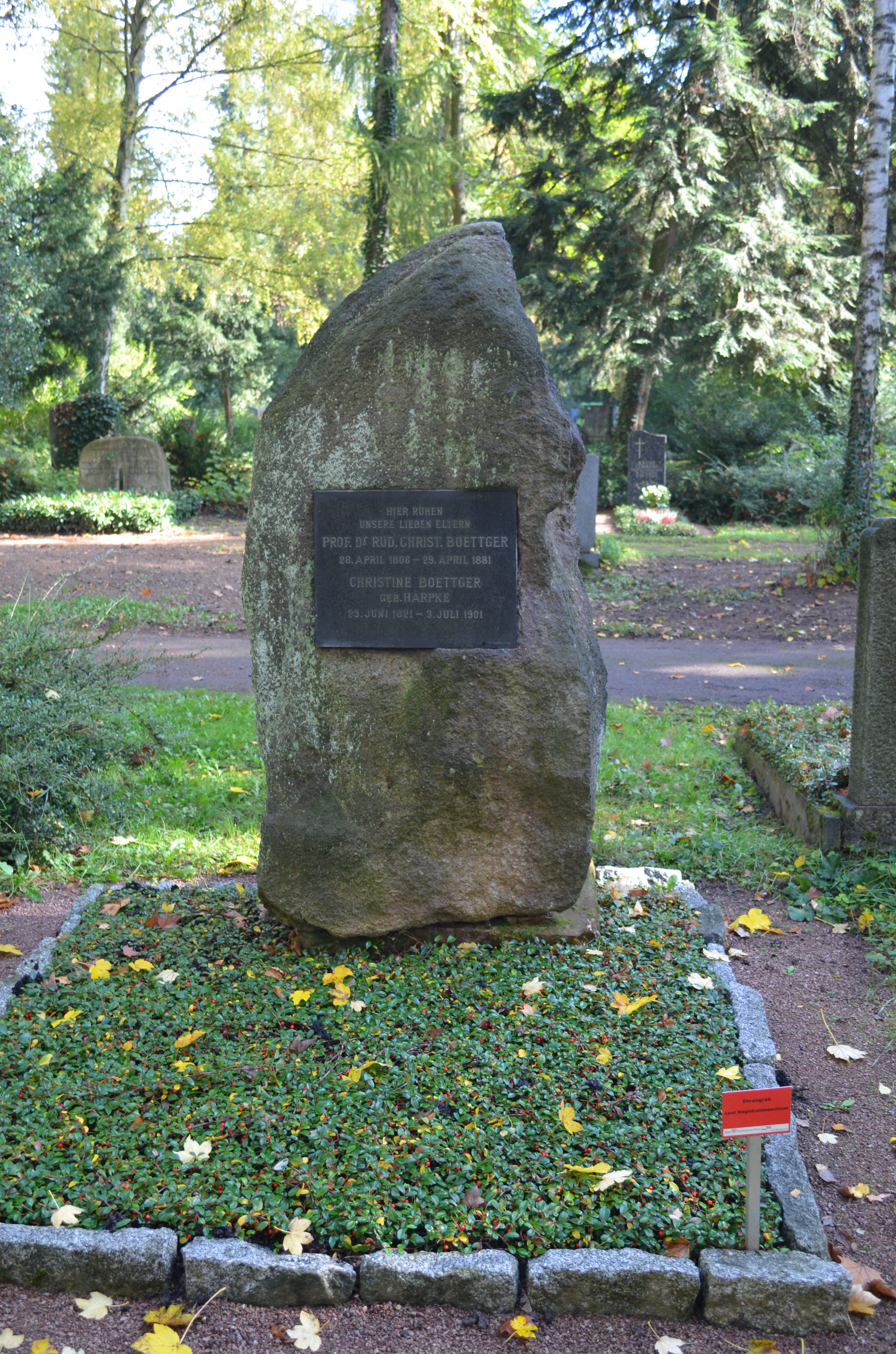 Frankfurt, Hauptfriedhof, Ehrengrab J 751a Boettger